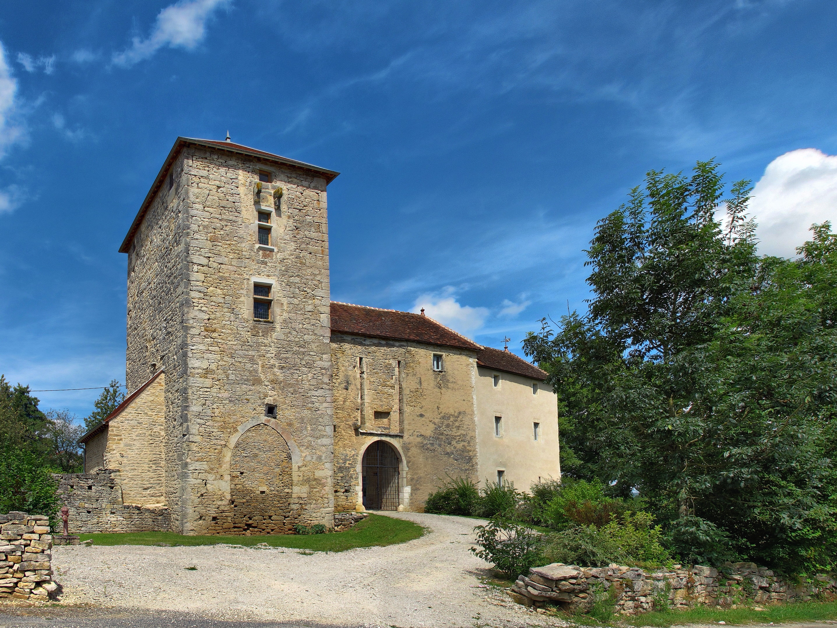 Inscrit aux monuments historiques sous le numéro PA00101620